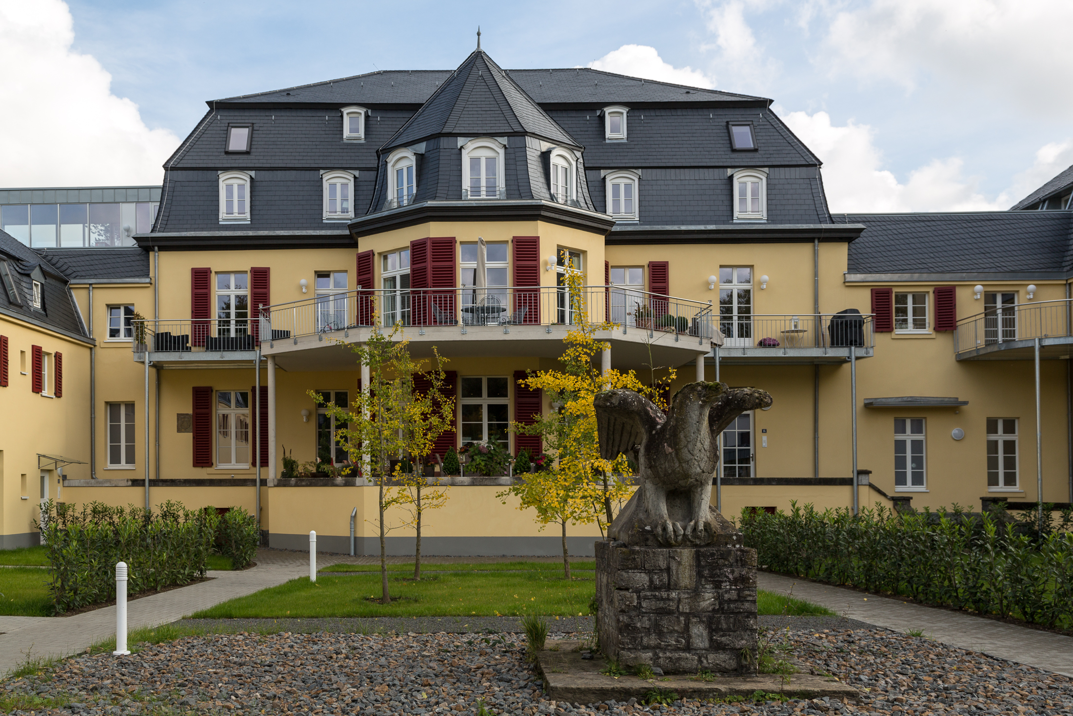 Rösrath, Denkmalnummer 23, Venauen (Haus Venauen) nach der Renovierung